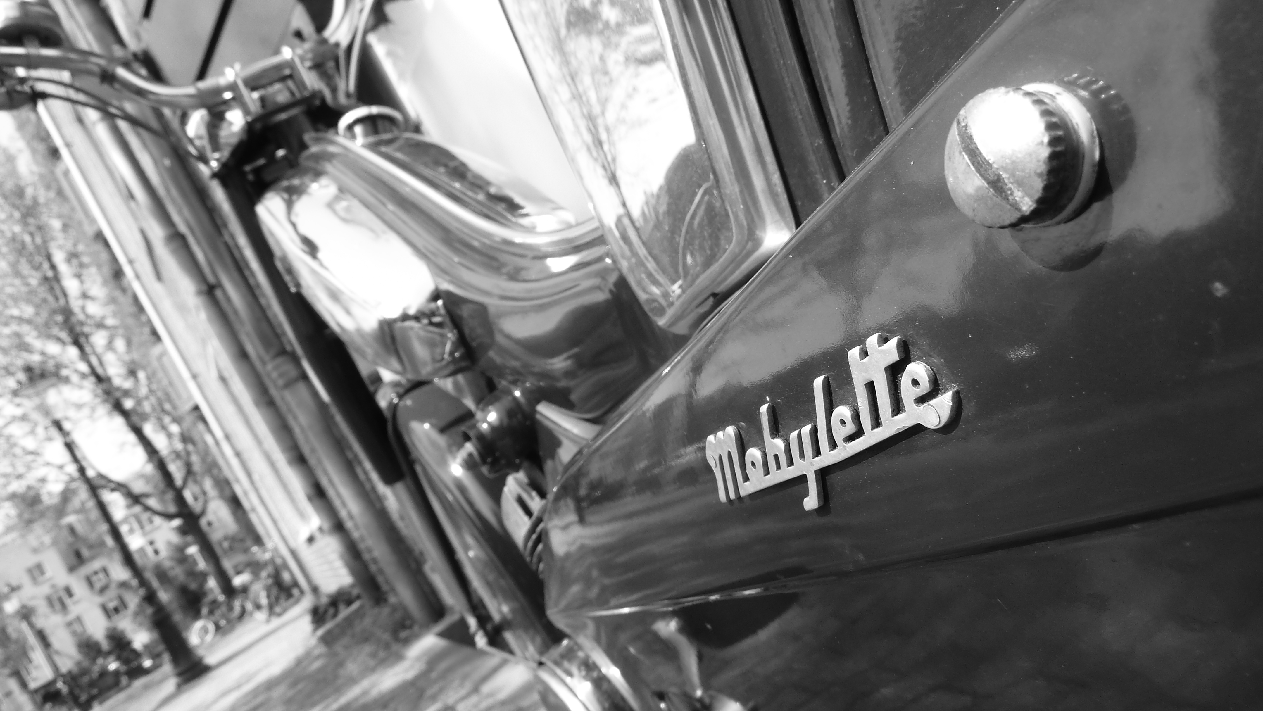 Une mobylette, dans Amsterdam.